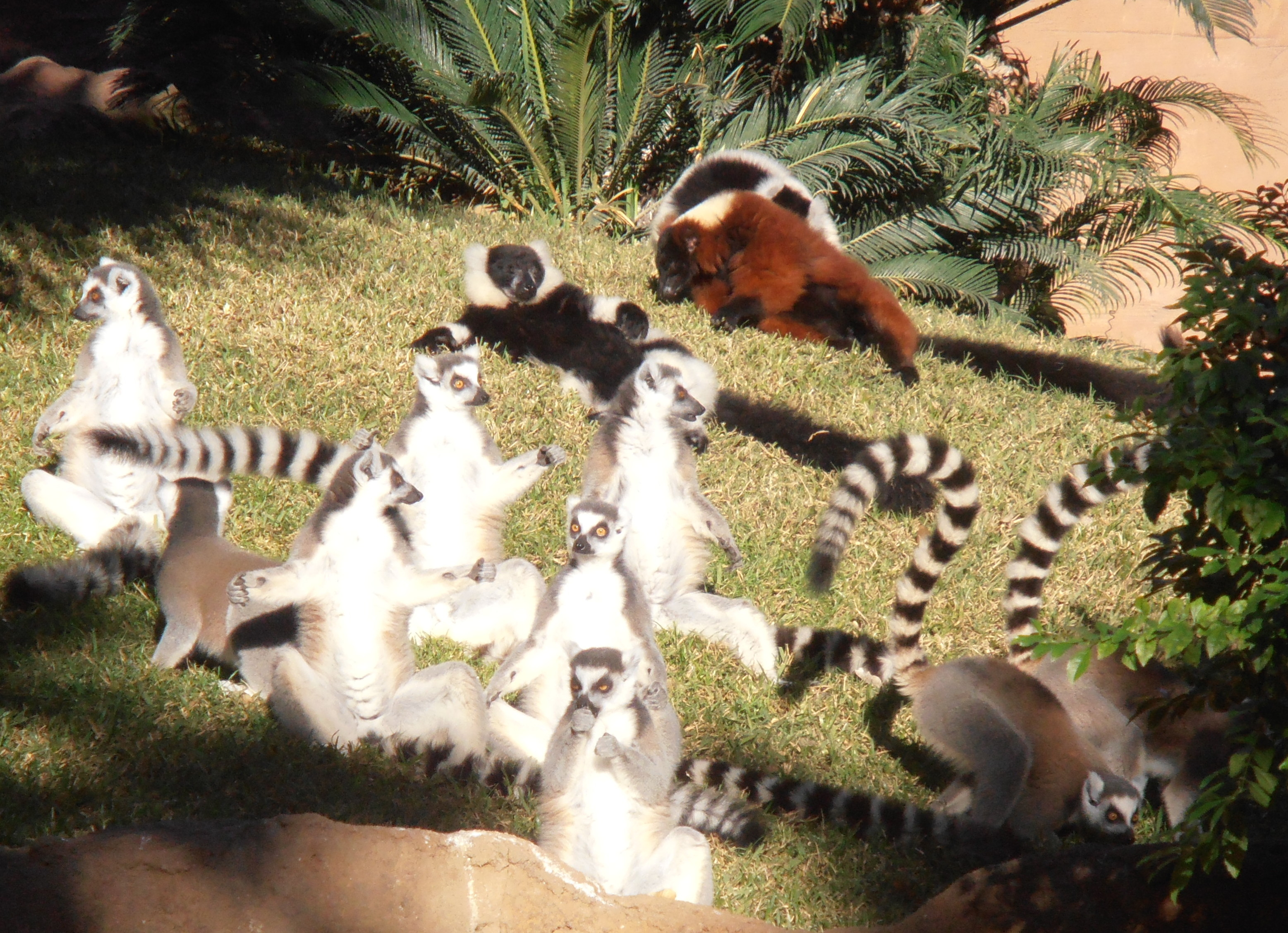 Gruppo di Lemuri (Bioparc di Fuengirola)